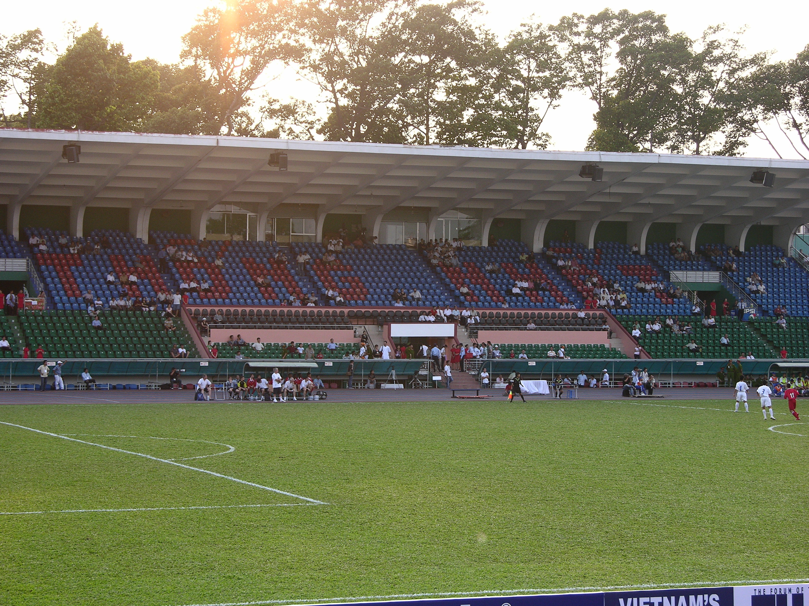 Thống Nhất Stadium, tier A